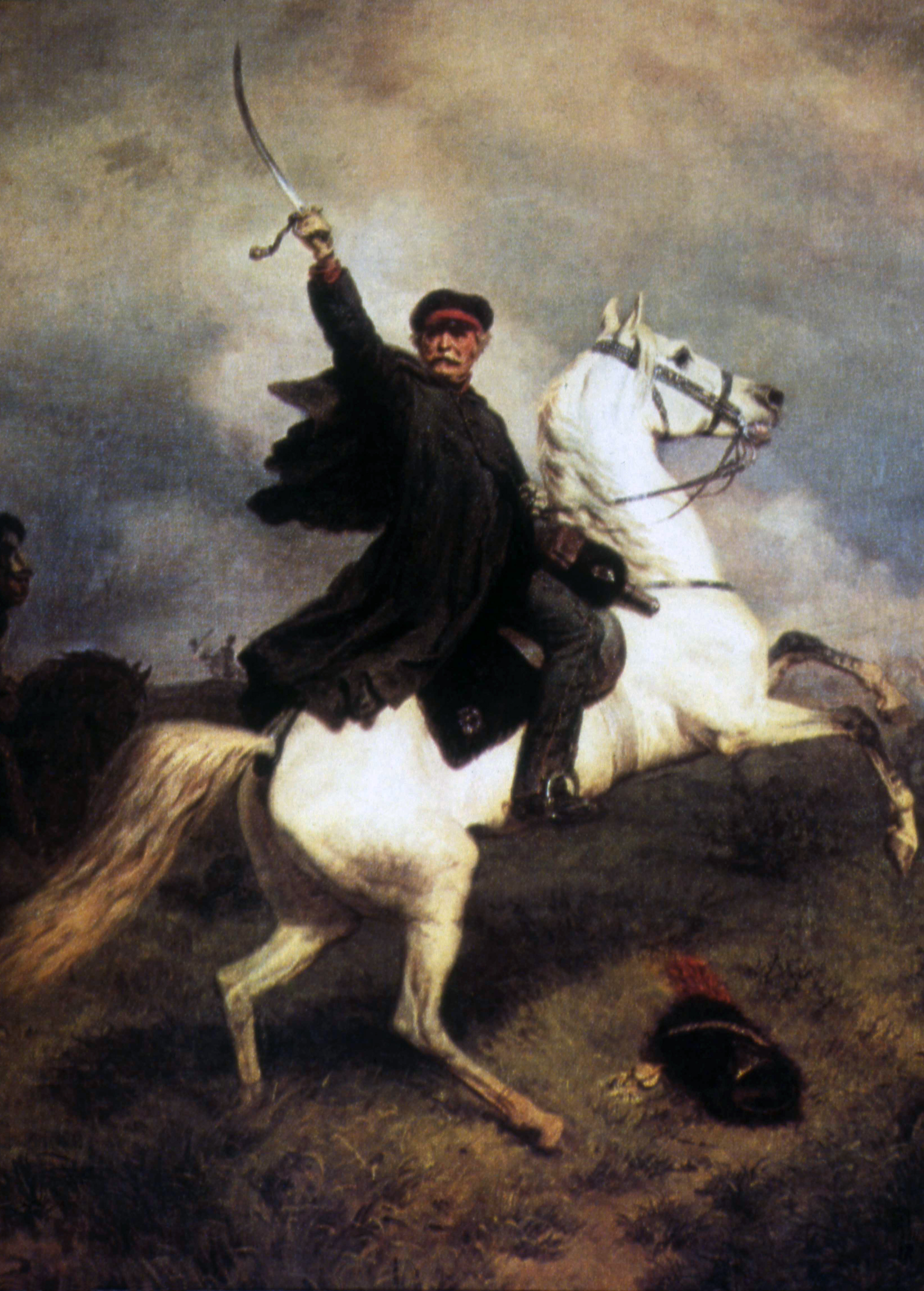 Im Auftrag des Obersten Prinzen Heinrich VII. von Reuß in Bonn.